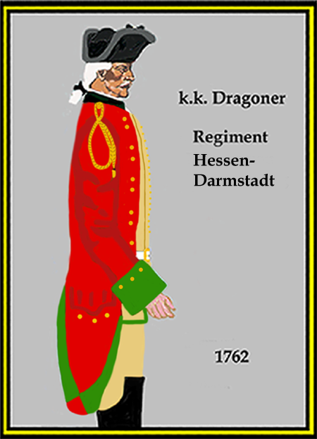 Österreichishes Dragoner-Regiment „Hessen-Darmstadt“ 1762 (Aus: L.& F. Funcken - „L'Uniforme et les Armes des soldats de la guerre en dentelle II“) Castermann (Tournai 1976)